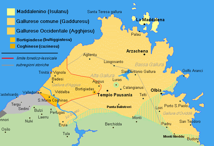 mappa delle varianti locali del dialetto gallurese